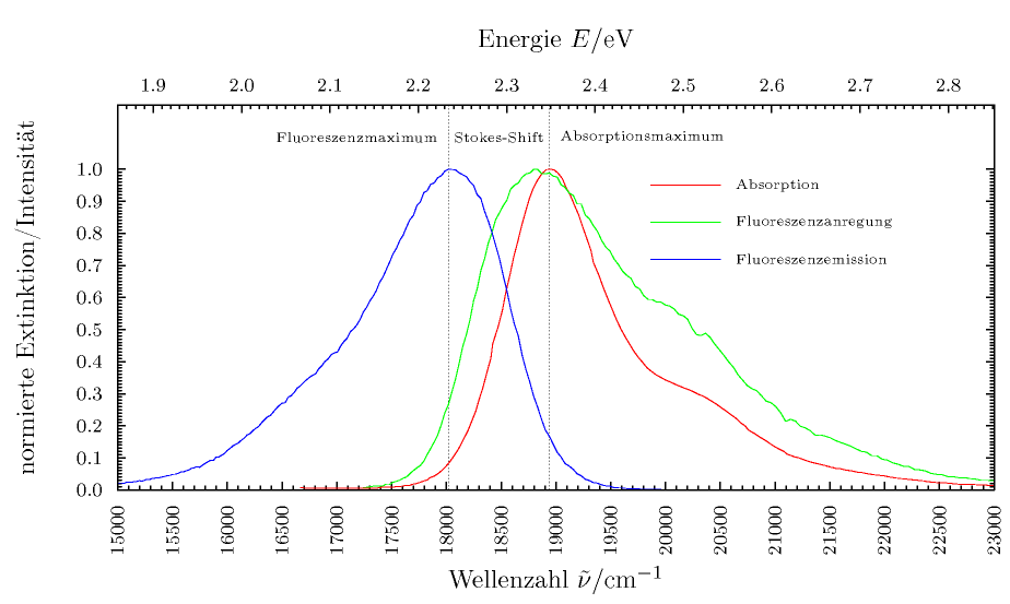 Absorptions-, Fluoreszenzanregungs- (Detektion bei 556nm), und Fluoreszenzemissionsspektrum (Anregung bei 500nm) einer Lösung des Farbstoffs Rhodamin 6G.